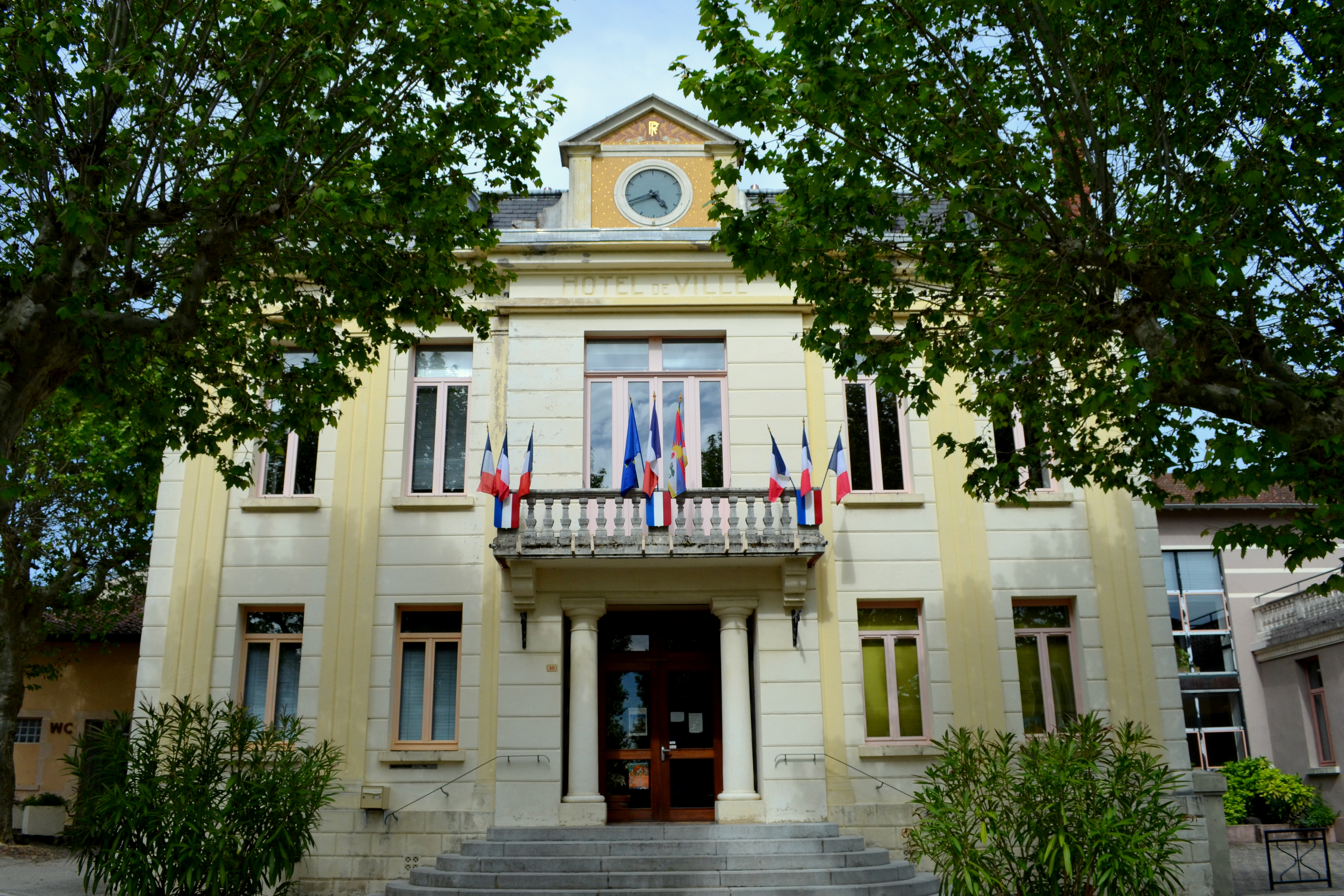 Mairie d'Hauterives, Drôme, France. Object location45° 15′ 20.88″ N, 5° 01′ 39.72″ E